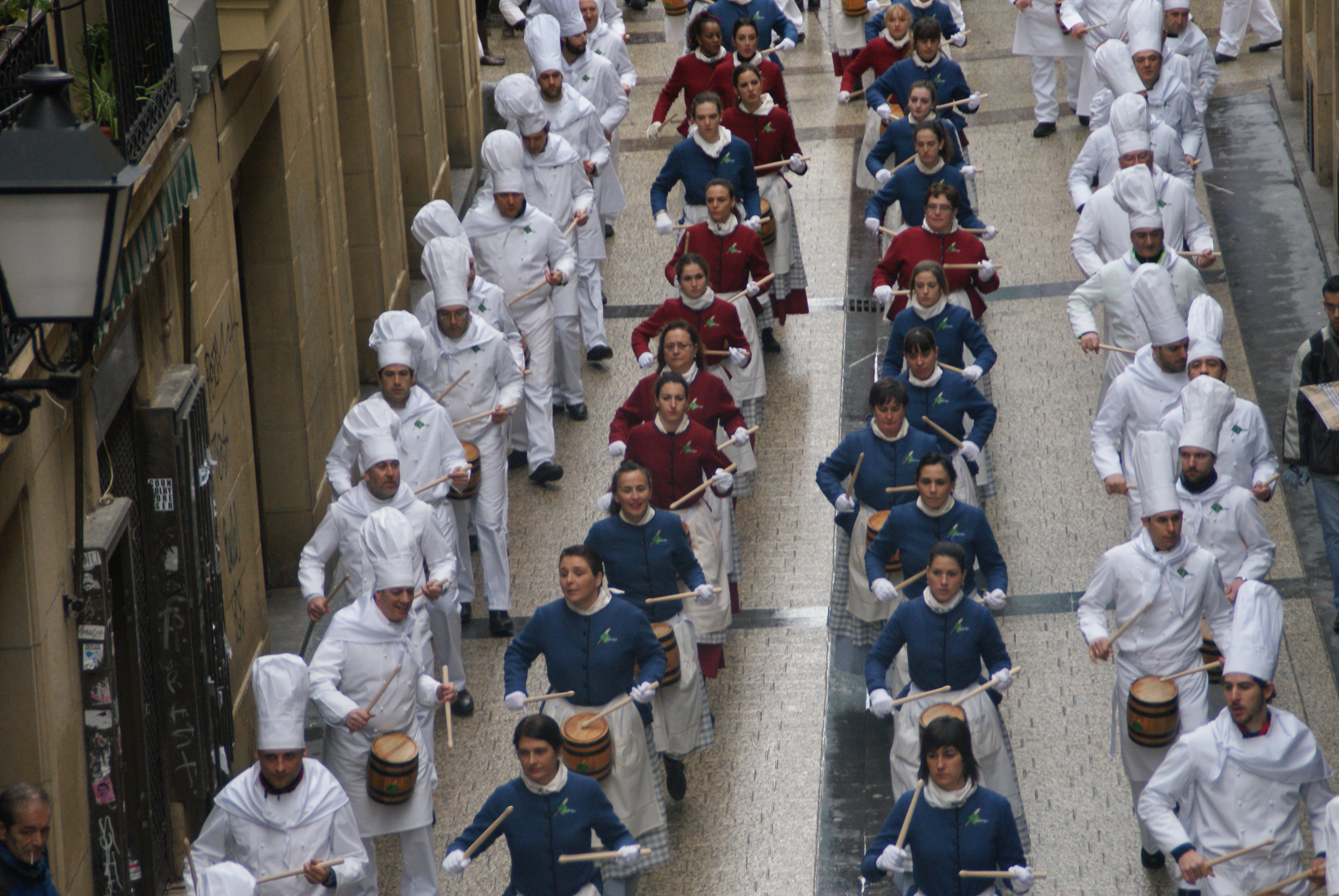 Tamborrada de San Sebastián, Compañía Ardatza 2015. Barriles en la calle Puerto